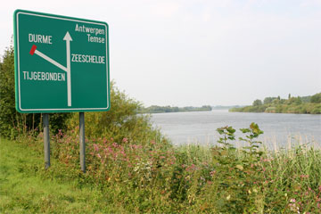 Schelde aan de monding van de Durme, eigen foto juli 2004, hiermee onder GFDL gebracht